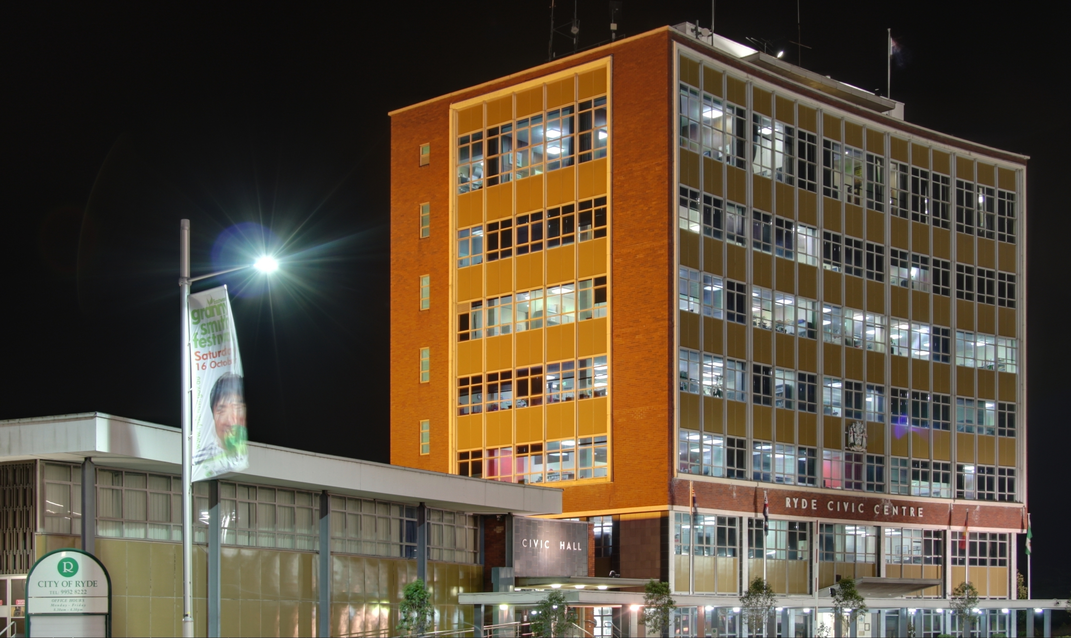 Ryde Civic Center